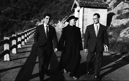 Laspiur, aita Oinandia eta Kapanaga (lehen ezkerretik) Arantzazun